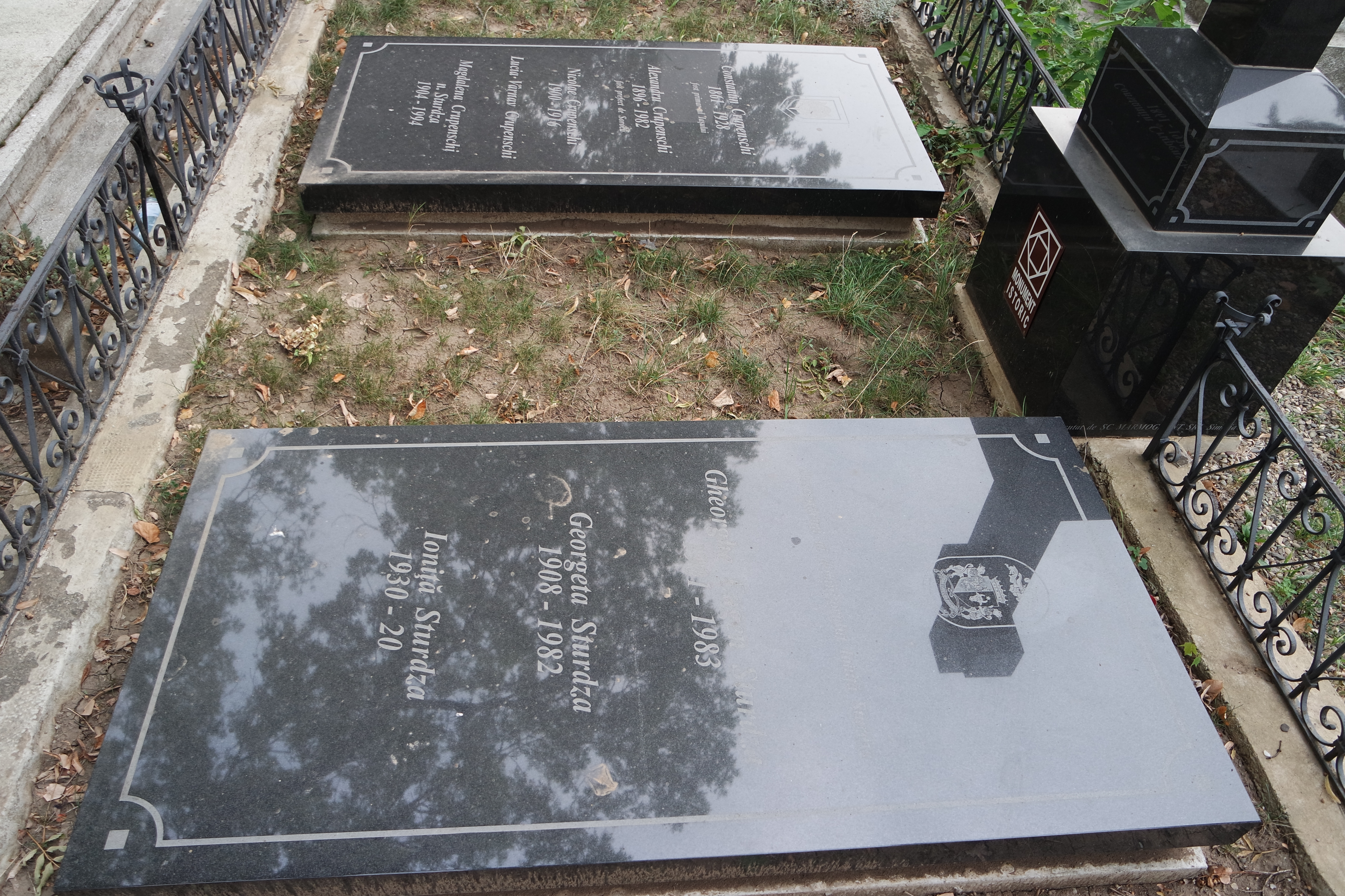 Mormântul magistratului Constantin Crupenschi